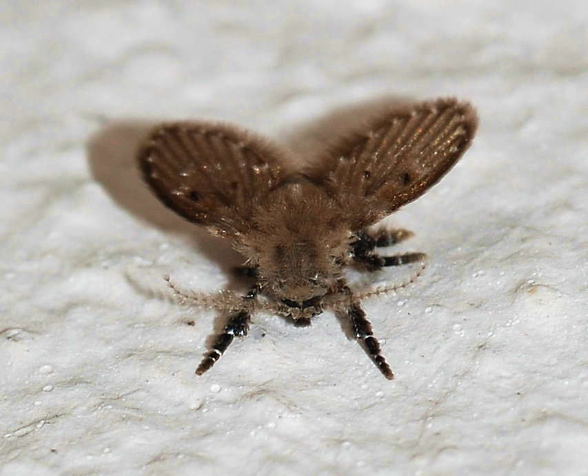 A drain fly (Clogmia albipunctata)